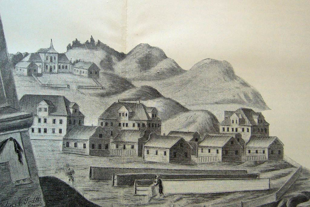 Гарадніца ў 1789 г. на малюнку Адама Тота